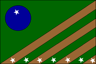 Aroeiras do Itaim Bandeira